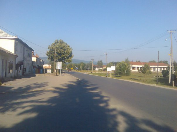 centar sela Brestovca